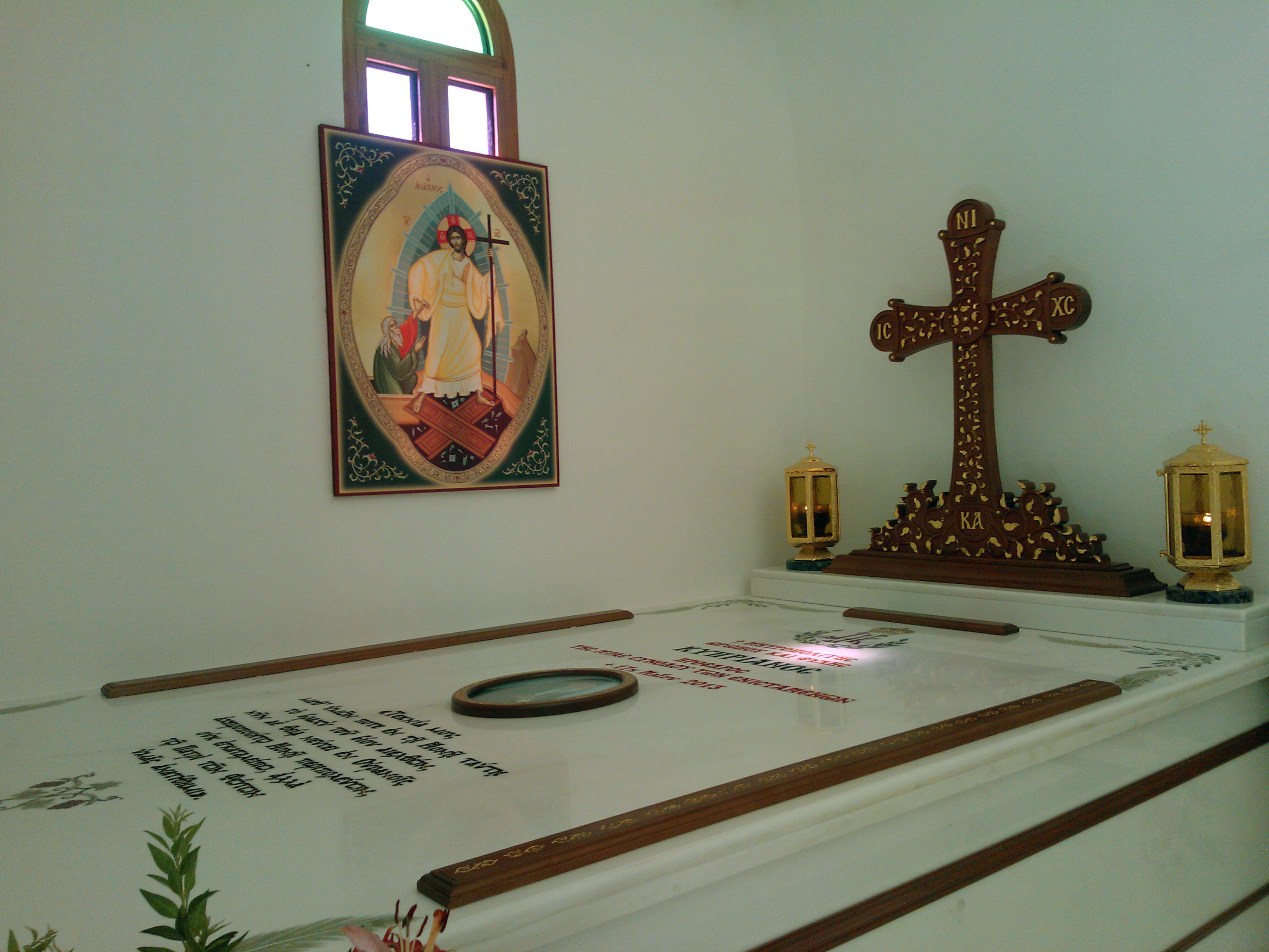 Гробница митрополита Киприана в часовне св. Иоанна Максимовича